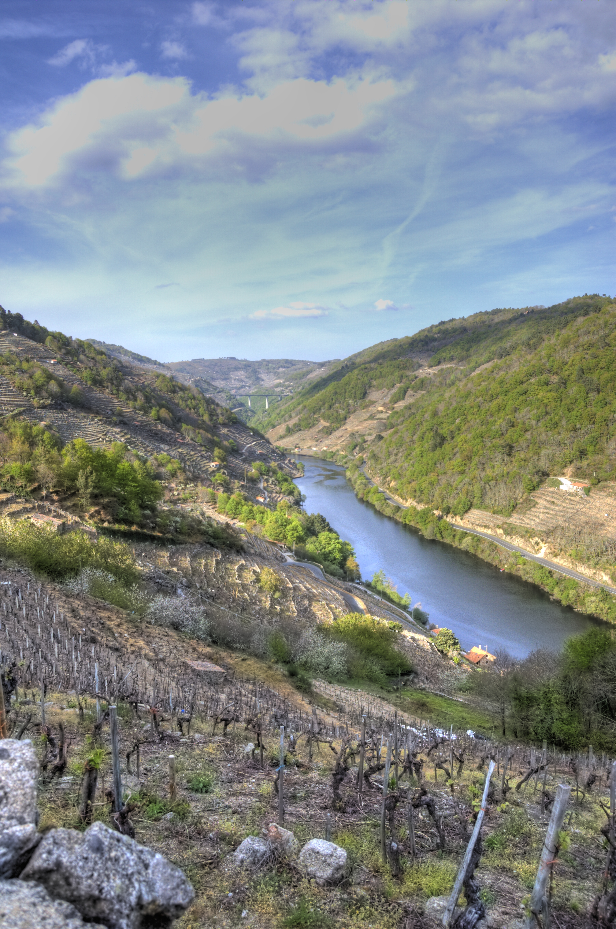 La Ribeira Sacra,tambien llamado cañon del Sil es una zona entre las provincias de Lugo y Ourense en Galicia es una zona de cultivo de vino con denominación de origen ribeira sacra , Belesar Lugo 2009